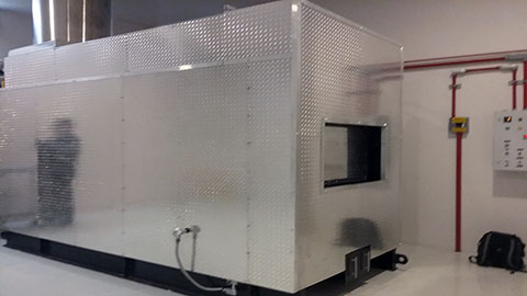 Horno Crematorio manufacturado en México con tecnología norteamericana. Cuenta con una robusta construcción similar a la de los hornos norteamericanos. Cortesía de TECMAR México, CAPACIDAD 2,000,000 BTU/HR